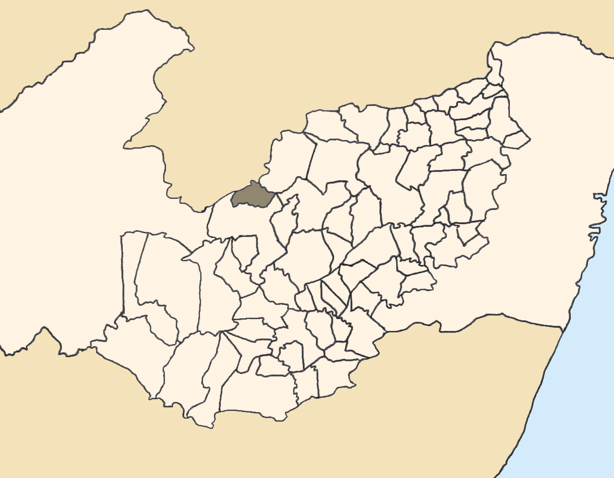 Mapa da mesorregião Agreste de Pernambuco (Brasil) subdivida em municípios. Em destaque, o município de Poção. Map of the brazilian state of Pernambuco (mesorregião Agreste) showing the city of Poção. Imagem tratada com o GIMP. Image made with GIMP.